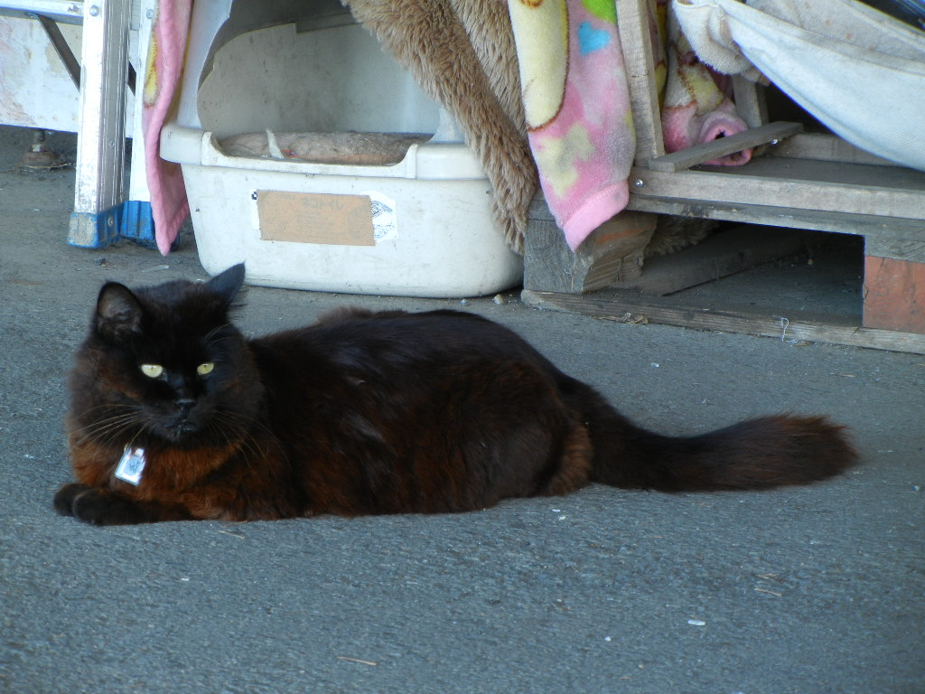 Station staff Osamu Hitachinaka.